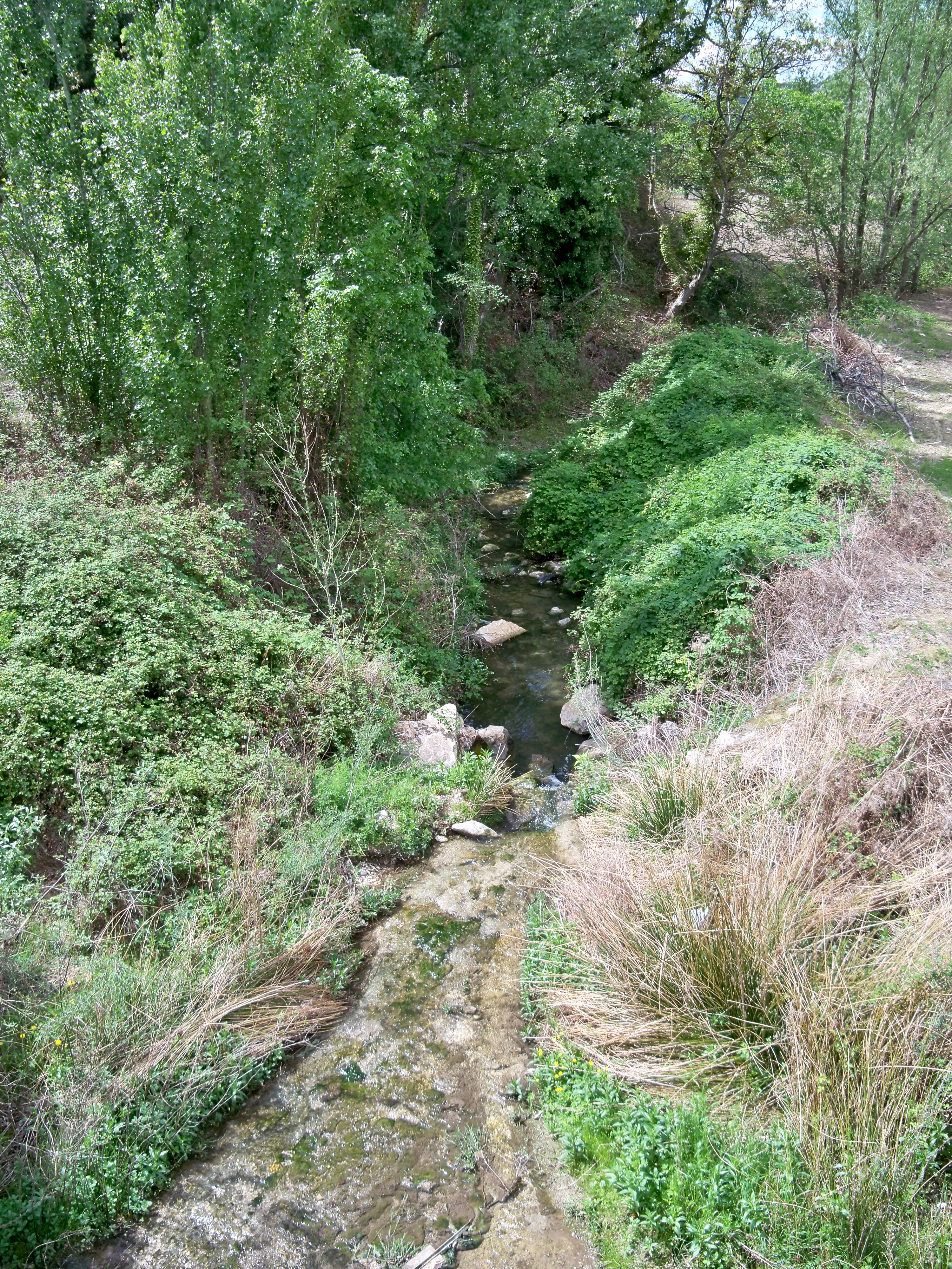 ruisseau le Rieu Froid au Hameau des Valettes à Beaumont du Ventoux (84)